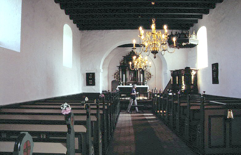 Kobberup Kirke, Kirkerummet set mod øst